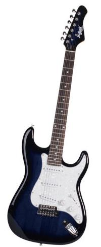 中文（台灣）: 電吉他